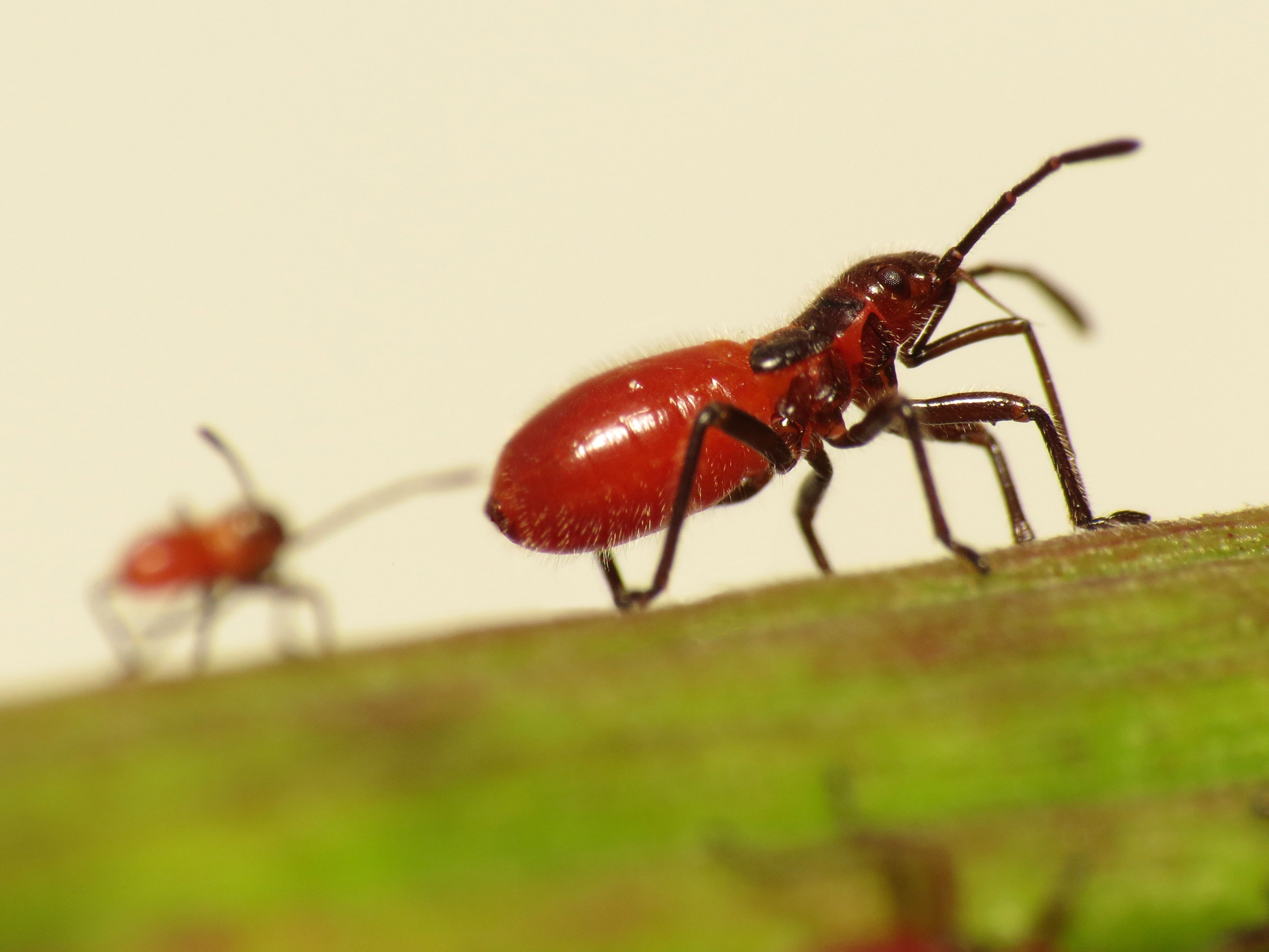 Caenocoris nerii. Els Poblets, Alicante, Spain